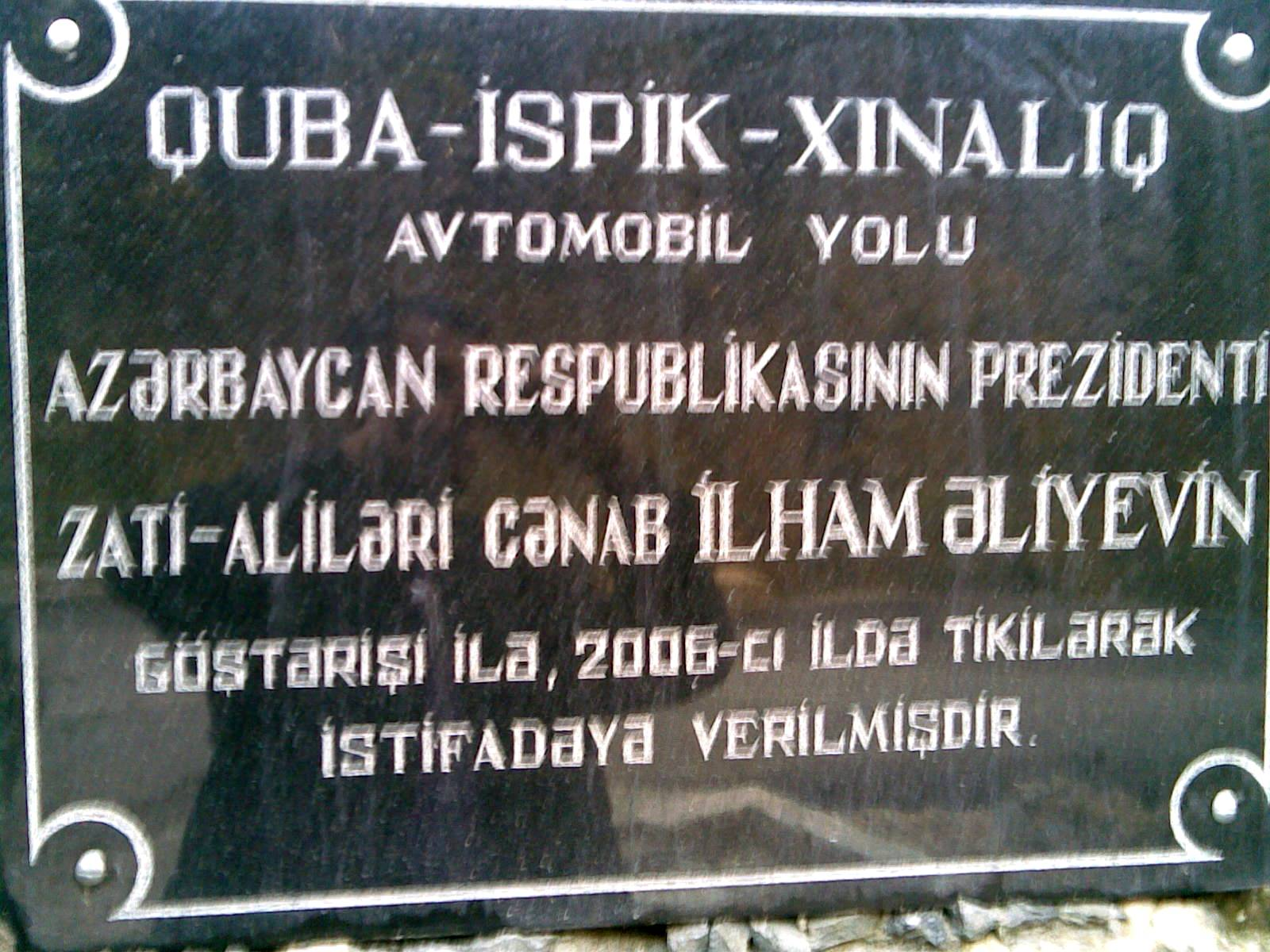 Quba-İspik-Xınalıq Avtomobil Yolu